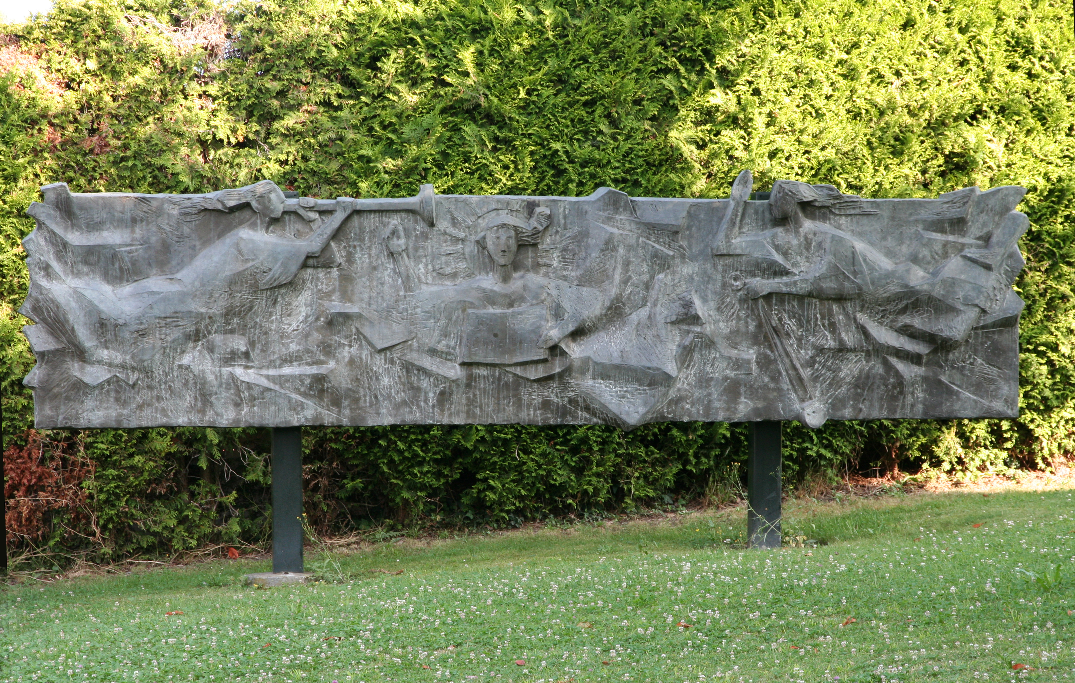 Römisch-katholische Pfarrkirche St. Stephan Männedorf